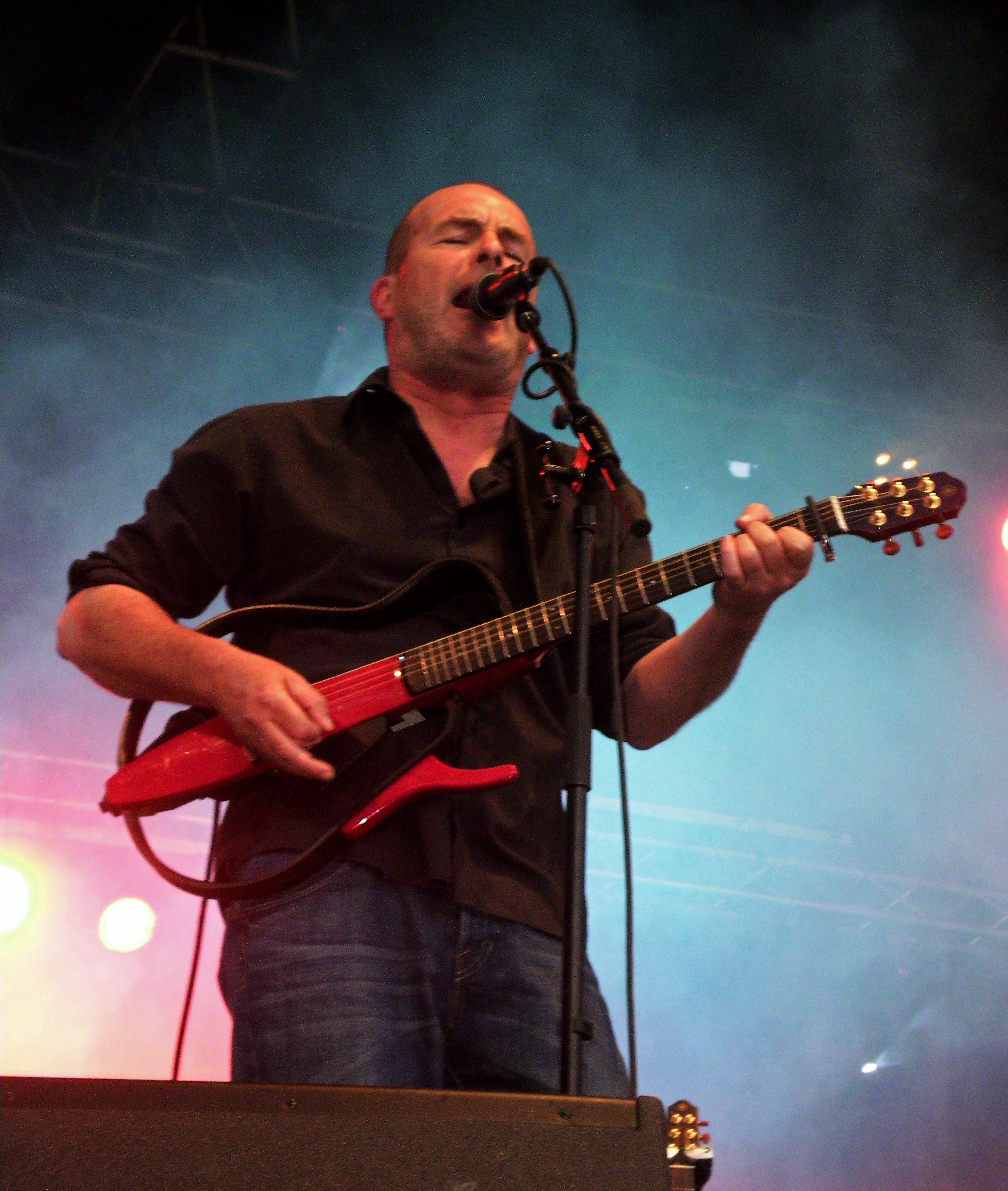 Jean-Pierre Riou du groupe Red Cardell avec le spectacle Fest-Rock accompagné du Bagad Kemper à Saint-Pol-de-Léon lors des fêtes folkloriques du Léon le 15 juillet 2012.